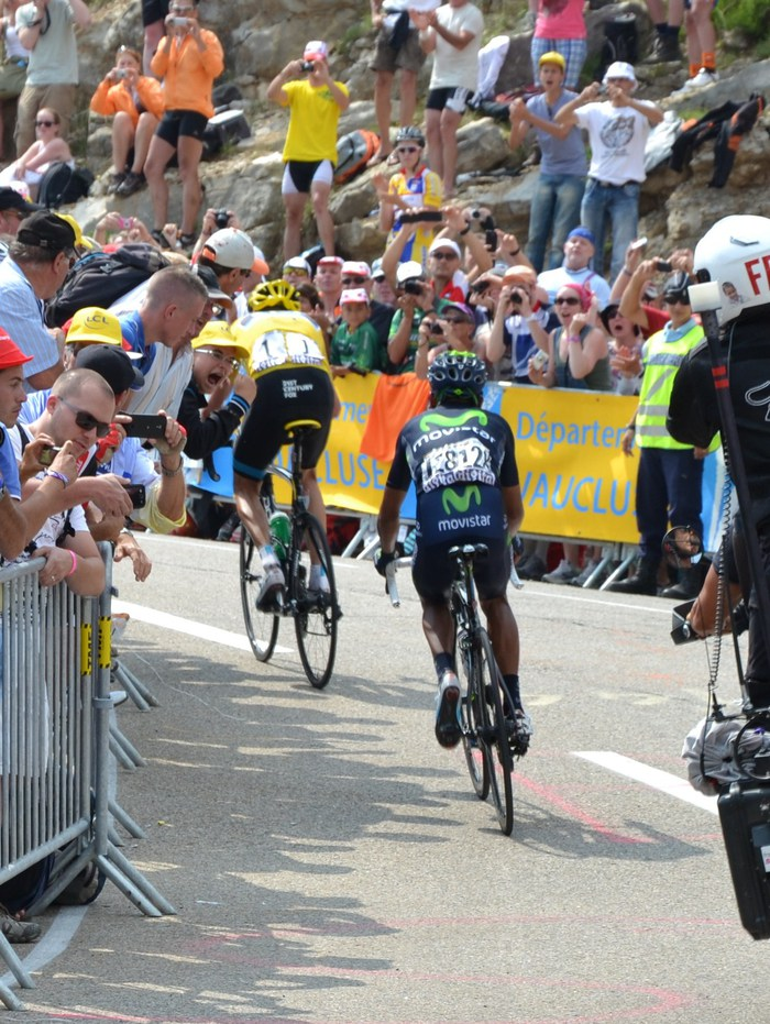 Christopher Froome et Nairo Quintana, au Chalet Reynard, Mont Ventoux, lors de la 15ème étape du Tour de France 2013